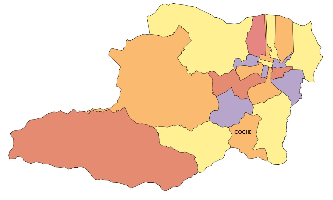 Mapa de la parroquia coche libertador Caracas Venezuela